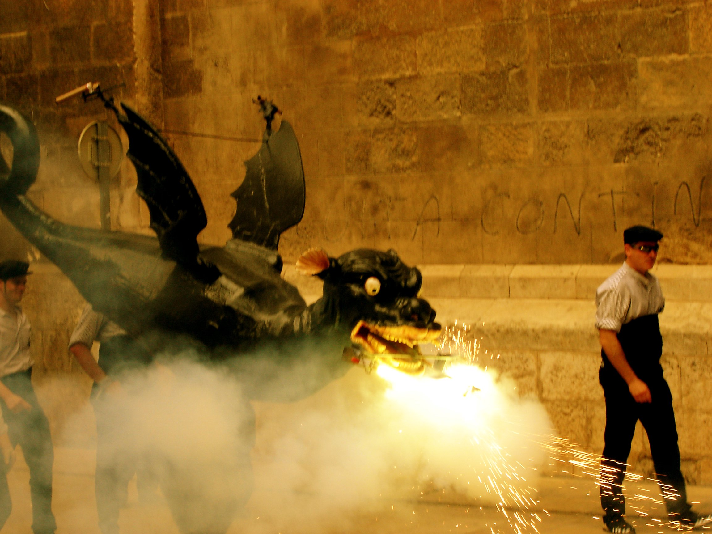 Drac de Vilafranca durant la cercavila de la Festa Major